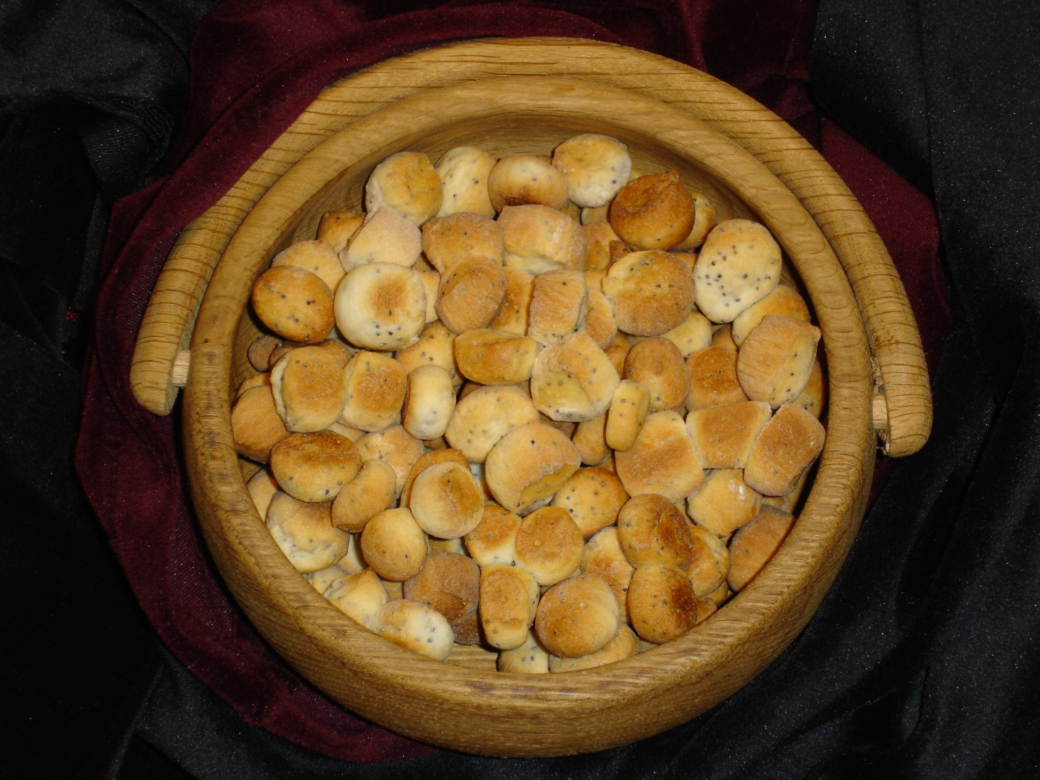 Kūčiukai